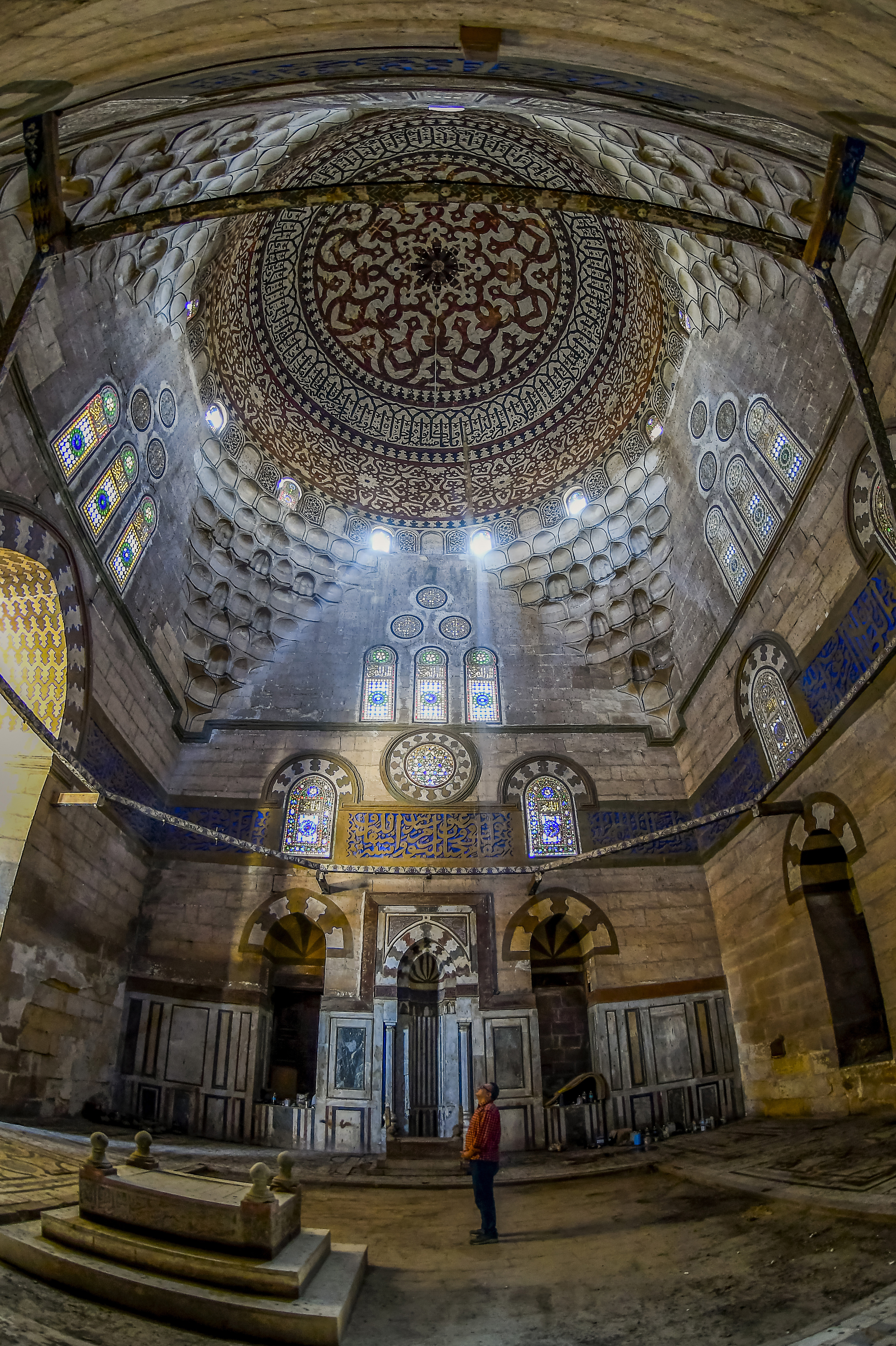 القبة الضريحية فرج بن برقوق فى منطقة جبانة المماليك